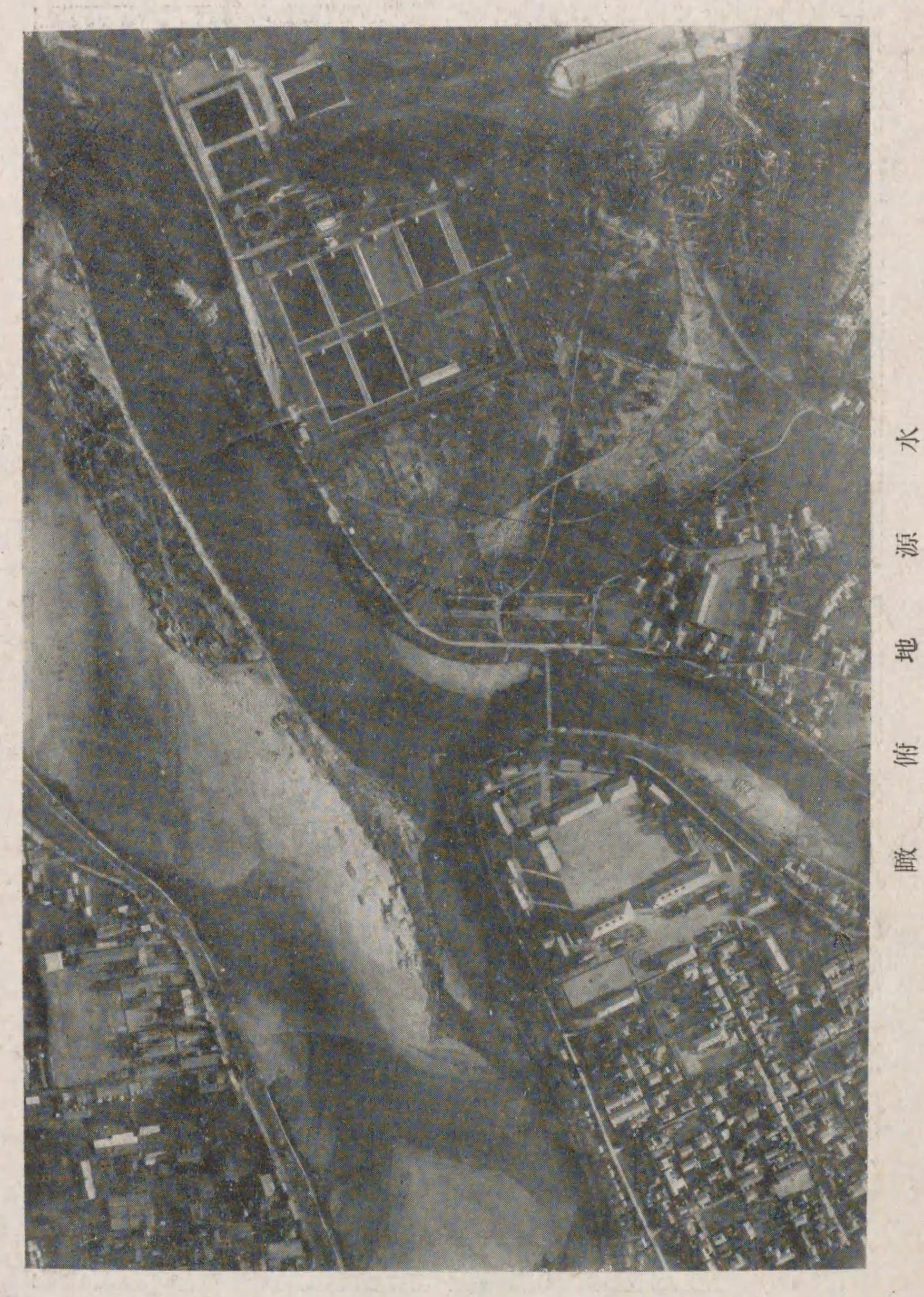 1930年代広島市牛田、旧太田川と京橋川の合流地点。